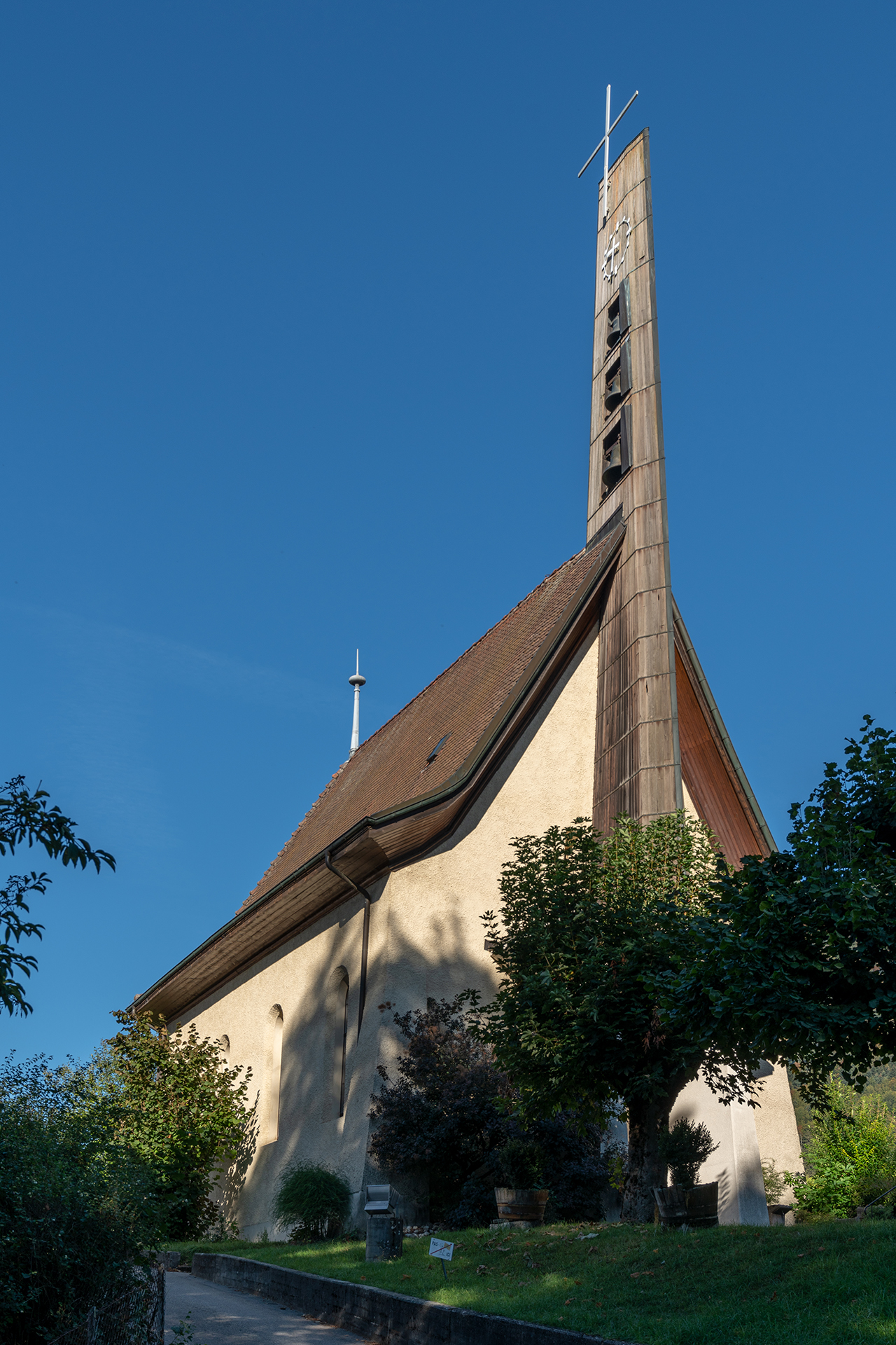 Reformierte Kapelle (1902) in Cortébert